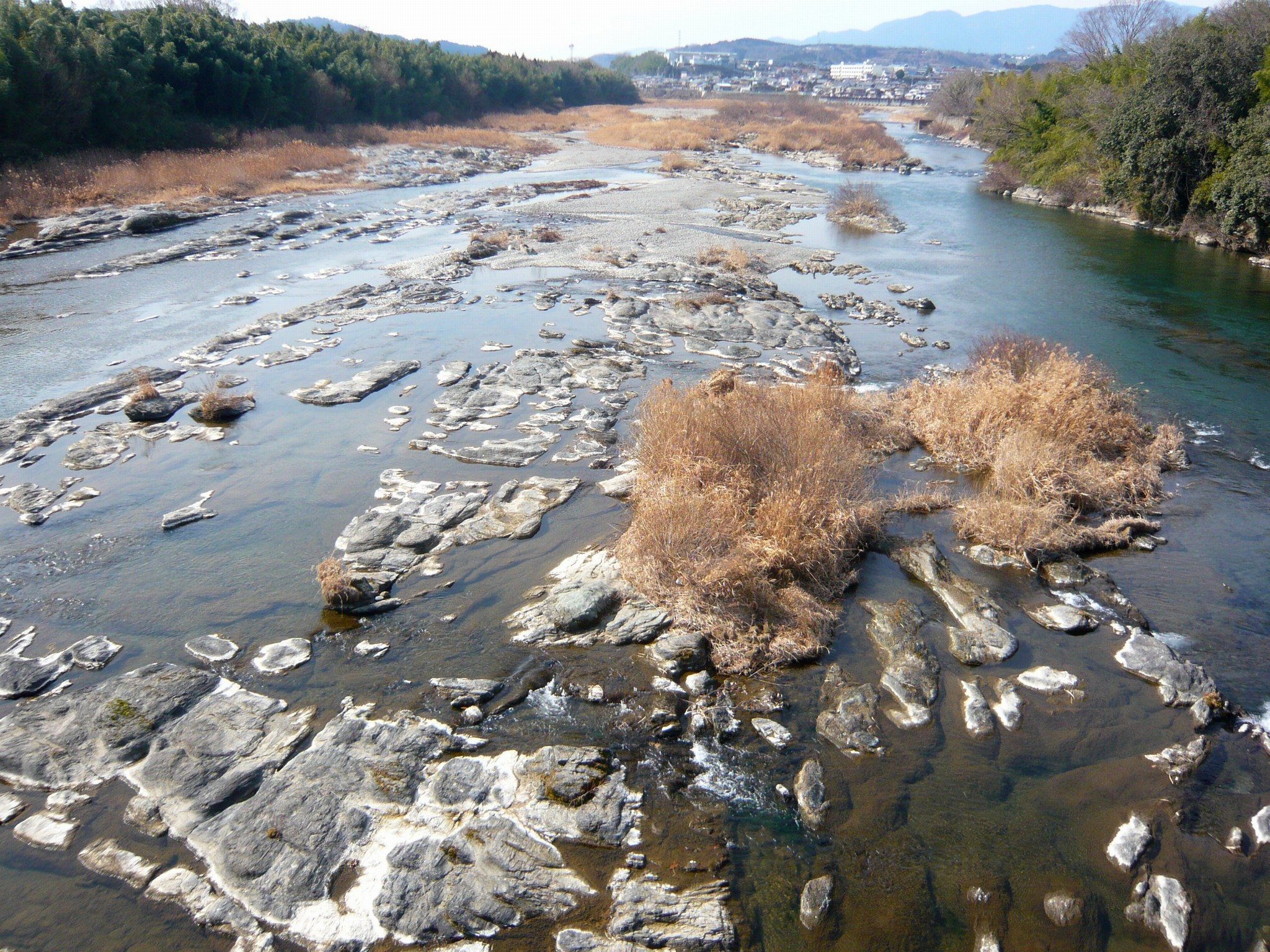 椿橋より Yoshinogawa, view from Tsubaki-bashi 2011.2.02